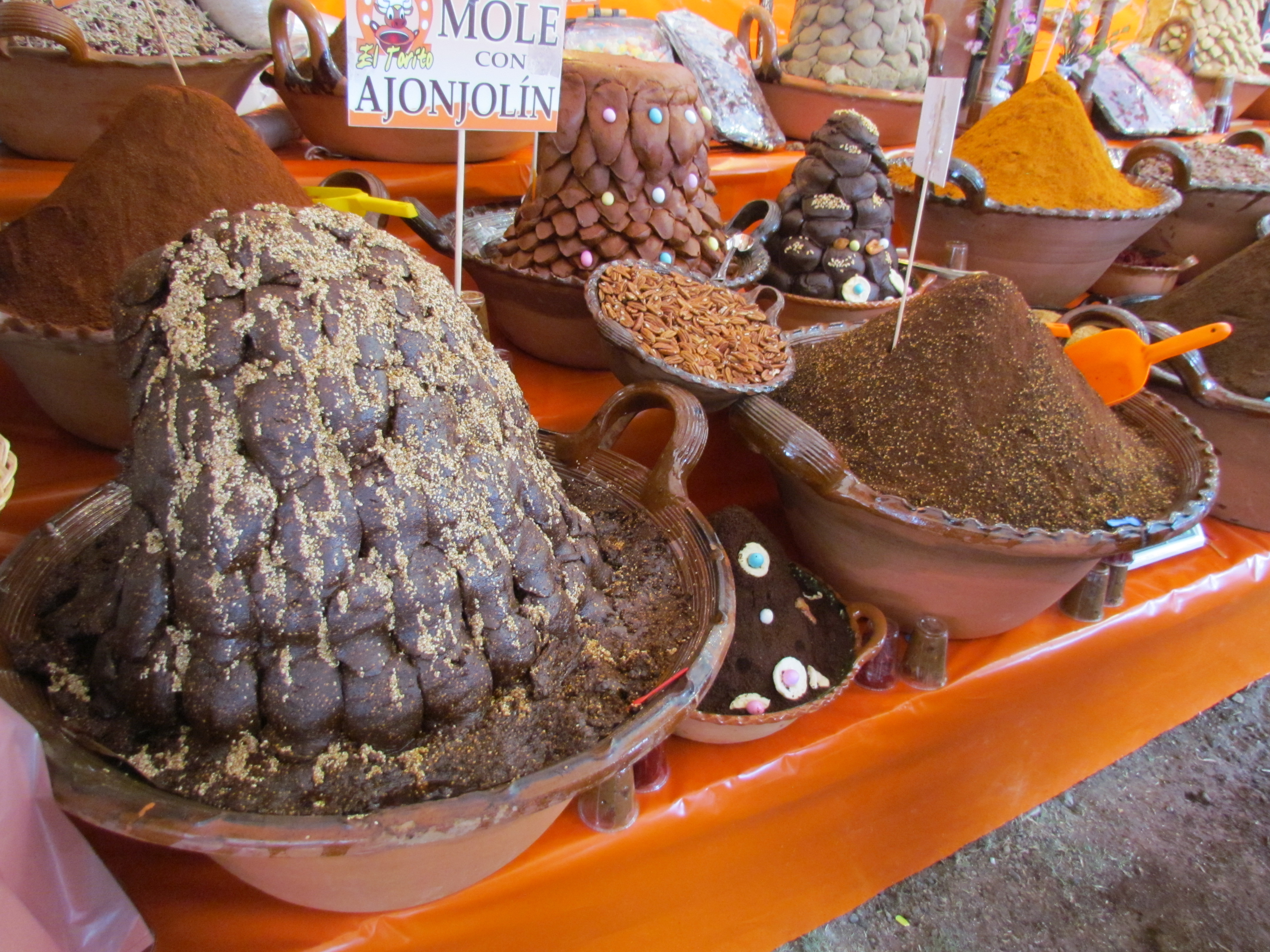 Puesto de venta de distintos tipos de Mole en la feria del mole 2014